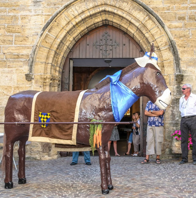 Bénédiction devant l'église Saint-Étienne de Valros (juillet 2013)